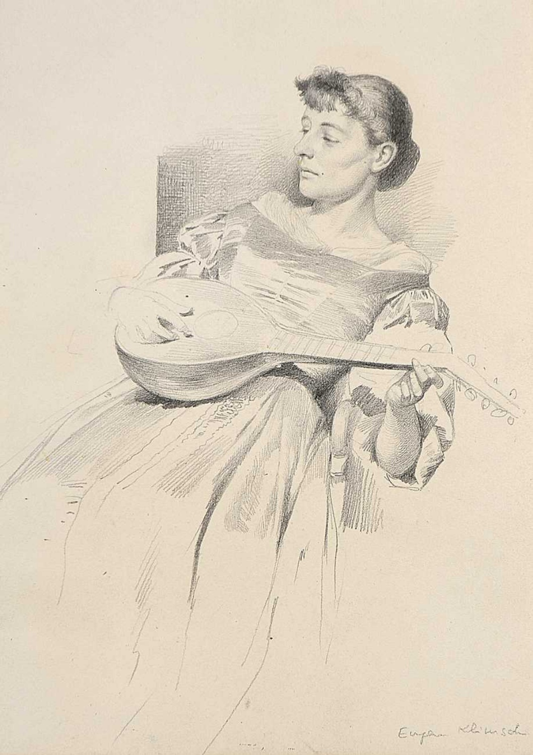 Lautenspielerin, Bleistiftstudie